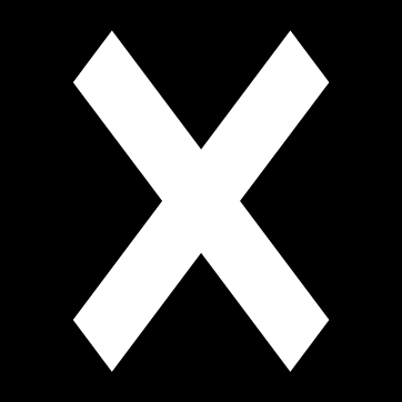 丹羽家紋、直違紋、違い棒